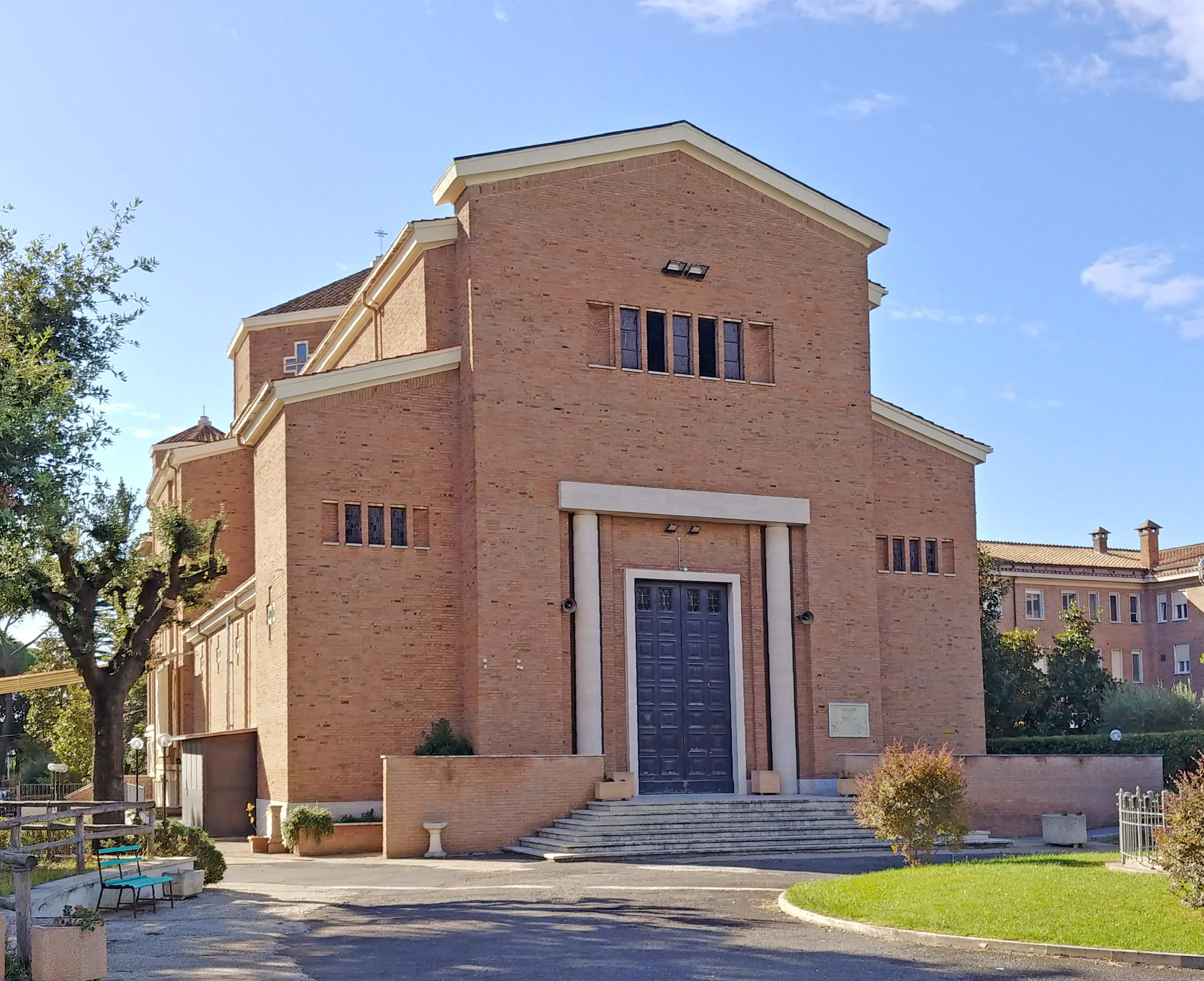 Esterno.